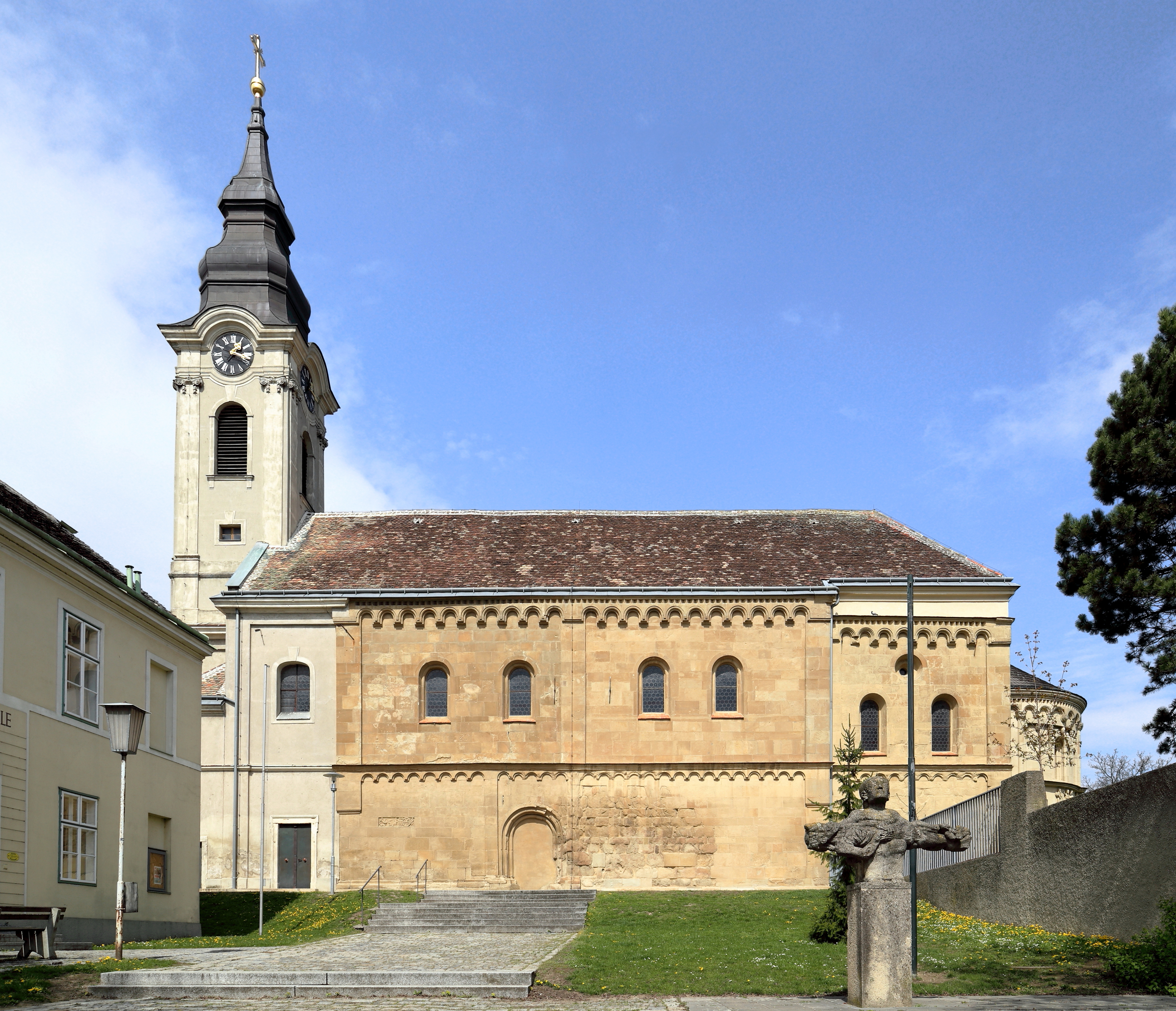 Südansicht der römisch-katholischen Pfarrkirche Mariae Geburt in Schöngrabern, ein Ortsteil der niederösterreichischen Marktgemeinde Grabern.Das Langhaus, das leicht eingezogene Chorquadrat und die Rundapsis sind spätromanisch (um 1210/30). Ende des 18. Jahrhunderts wurde der Turm über dem Chorquadrat abgetragen und Anfang des 19. Jahrhunderts das Langhaus um ein Joch verlängert sowie der Westturm errichtet. Nach einem Brand wurde der Turm 1866 erhöht.